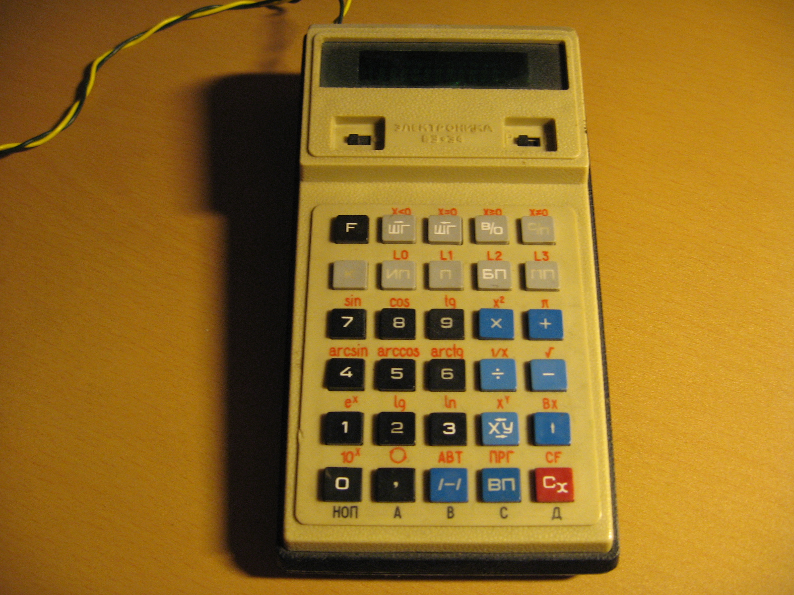 NSVL kalkulaator (programmeeritav)